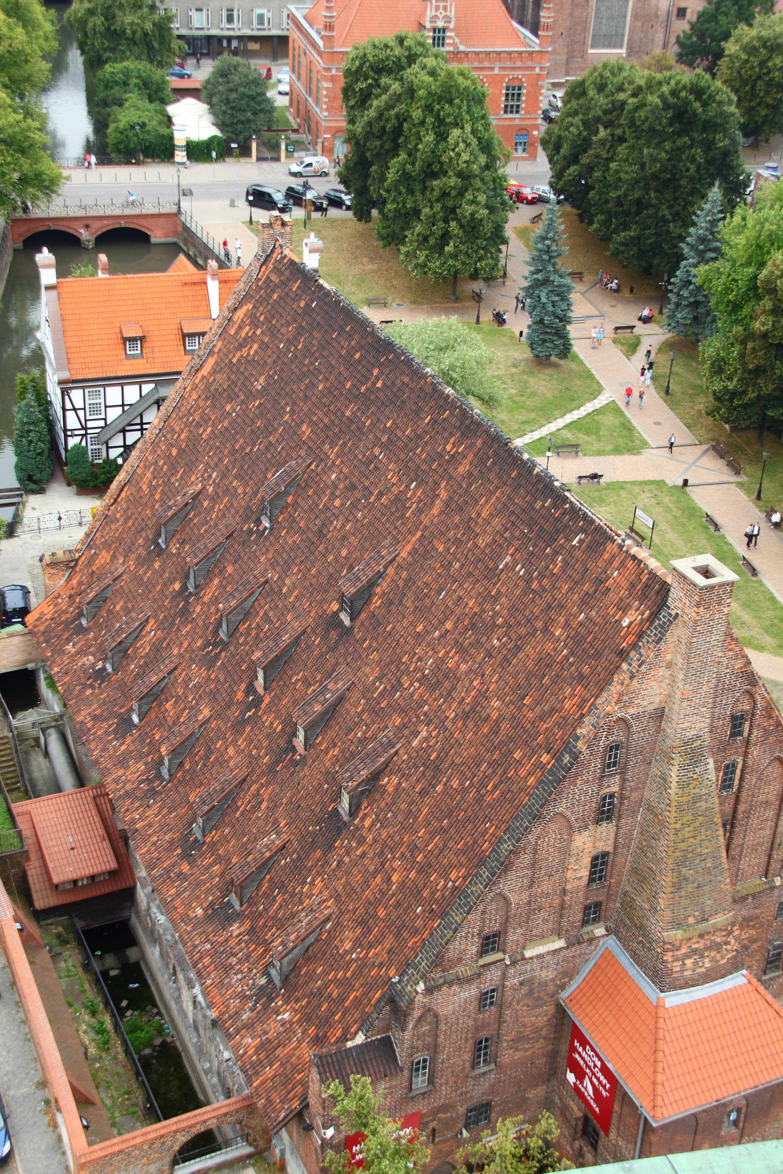 Gdańsk, młyn WIELKI, ob. sklepy, 2 poł. XIV-XIX, po 1962